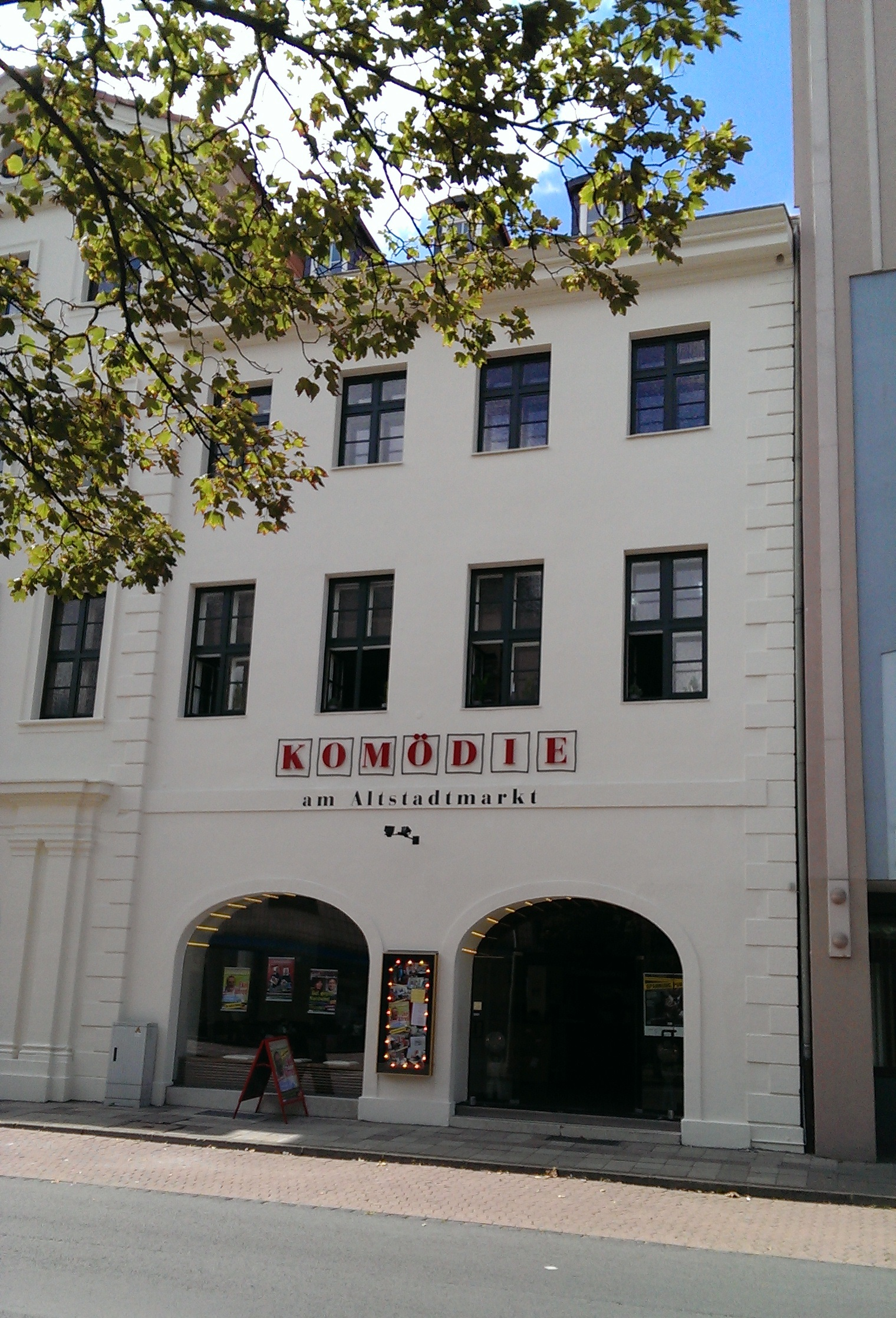 Gebäudefront der Komödie am Altstadtmarkt von der gegenüberliegenden Straßenseite